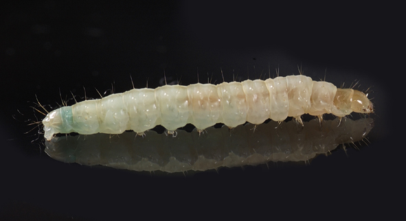 E. postvittana 5th instar larvae